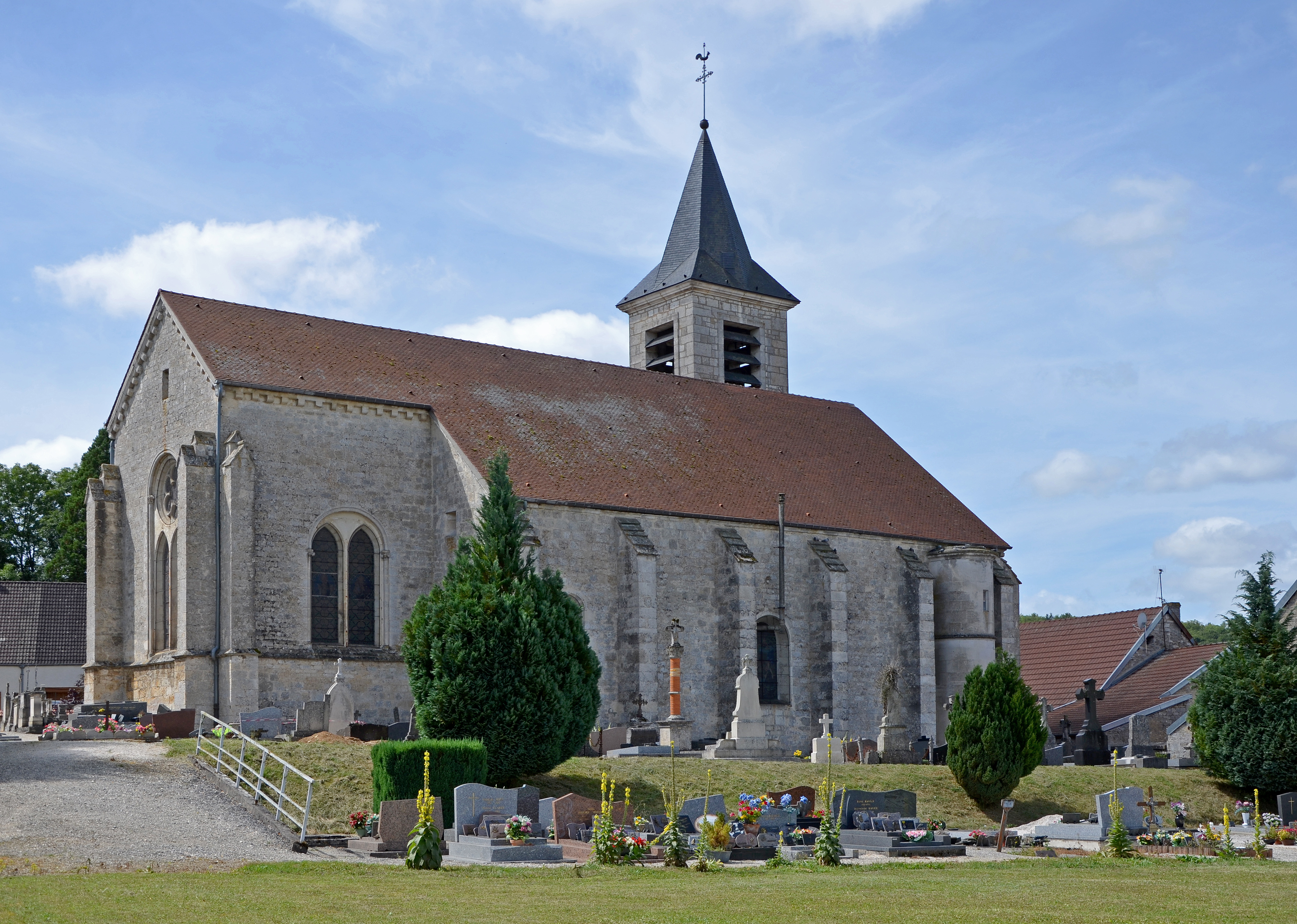 Église de Luzy-sur-Marne, Haute-Marne, Champagne-Ardennes, France